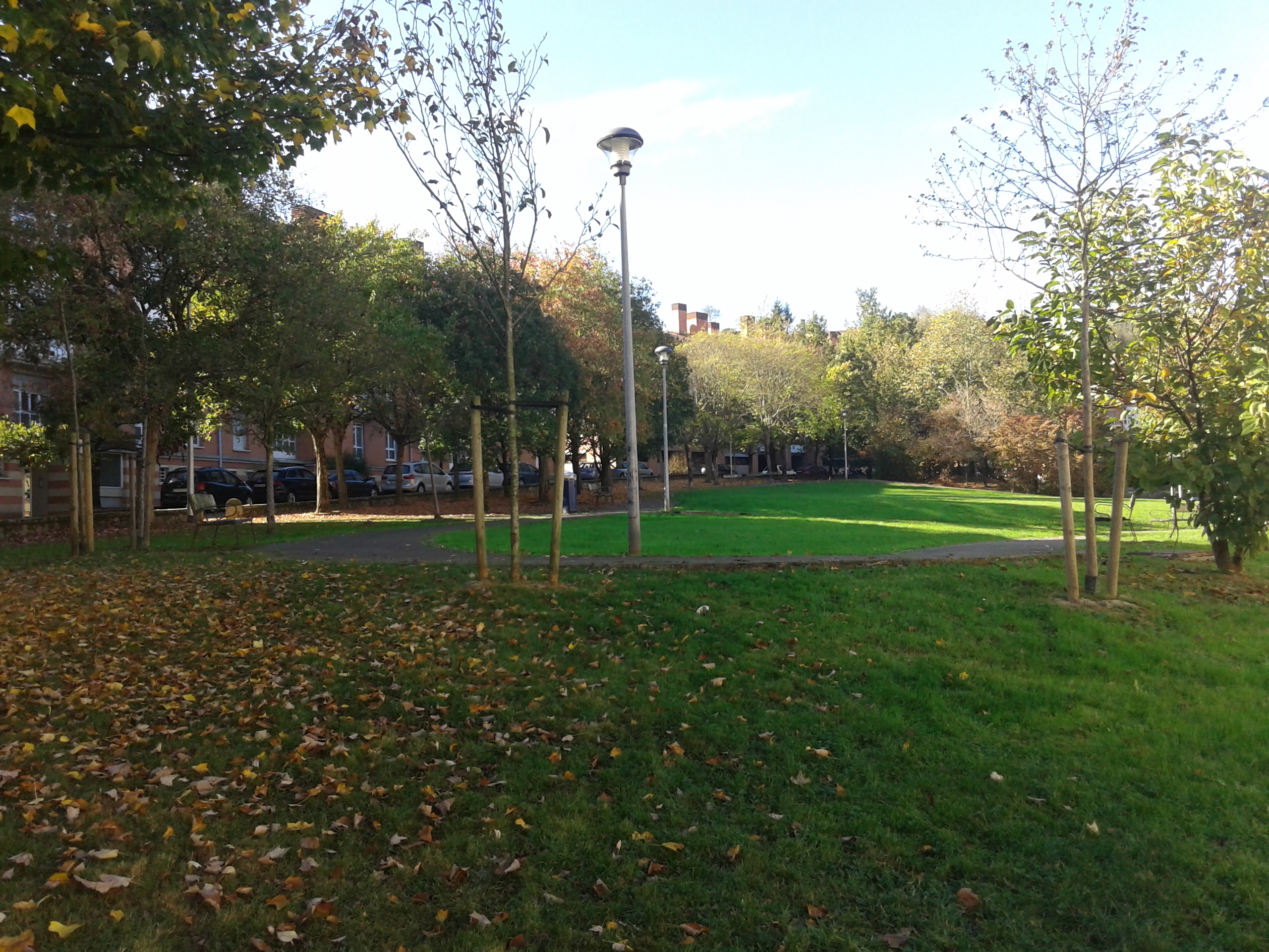 Orio parkea Donostiako Errotaburu auzunean.